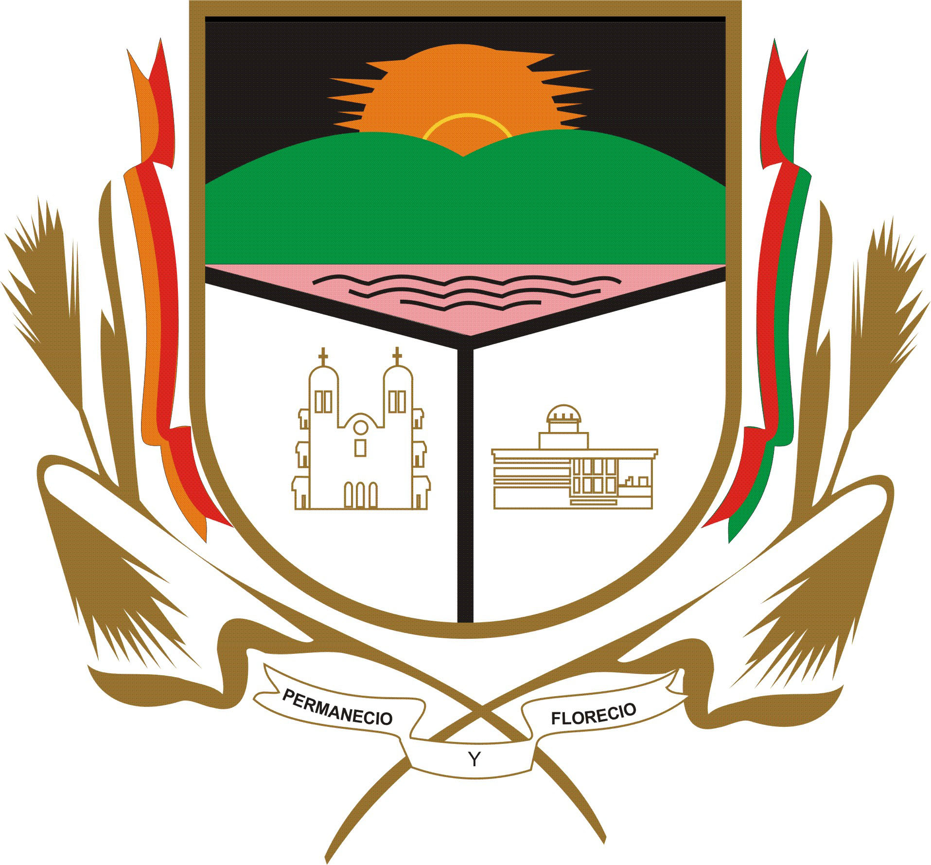 El escudo de San Carlos es obra de la artista Carolina Martha Nieves, reconocida internacionalmente y tiene los siguientes significados; Dividido en tres partes (Jefe superior sobre dos Puntas) la principal indica con el amanecer entre las verdes colinas, iluminado por el sol, el nacimiento de la Villa junto a dos arroyos que desembocan en el mar por una sola vía (la división o Perla azul). En el Cuartel a la derecha, la Iglesia como símbolo de historia, protegiendo tas modestas viviendas iniciales. En el Cuartel de la izquierda, el progreso, la cultura, con su moderno edificio del Uceo, mostrando su Observatorio Astronómico. Se ornamenta con las banderas de Portugal, por haber sido poblado con isleños de las Azores y la de España, que colonizó esta tierra. Dos ramas de trigo debido al origen agrario y lo banda que dice "Permaneció y Floreció", certificando lo que deseaba el Fundador Gral, y Virrey Pedro de Cevallos: "QUE PERMANEZCA Y FLOREZCA". El escudo fue solicitado por la Comisión Organizadora de los Actos celebratorios de! Bi-centenario de fundado San Carlos, en 1963. Su autora es destacada artista, dibujante. pintora. Profesora de Secundaria y ha realizado numerosas exposiciones internacionales llegando incluso a pintar en la residencia de los actuales Reyes de España y en distintos lugares de! mundo.